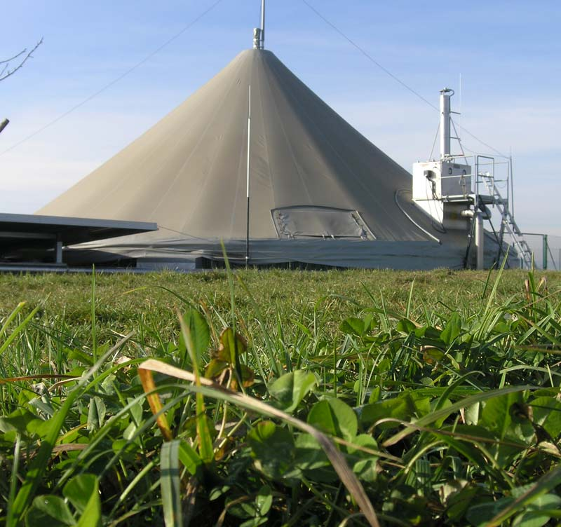 Biogasspeicher Güssing 2006 eigene Aufnahme